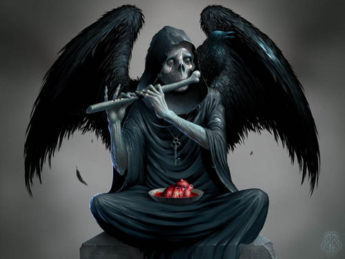 Қазақша (кирил): Өлімнің фантазиялық сипаттамасы